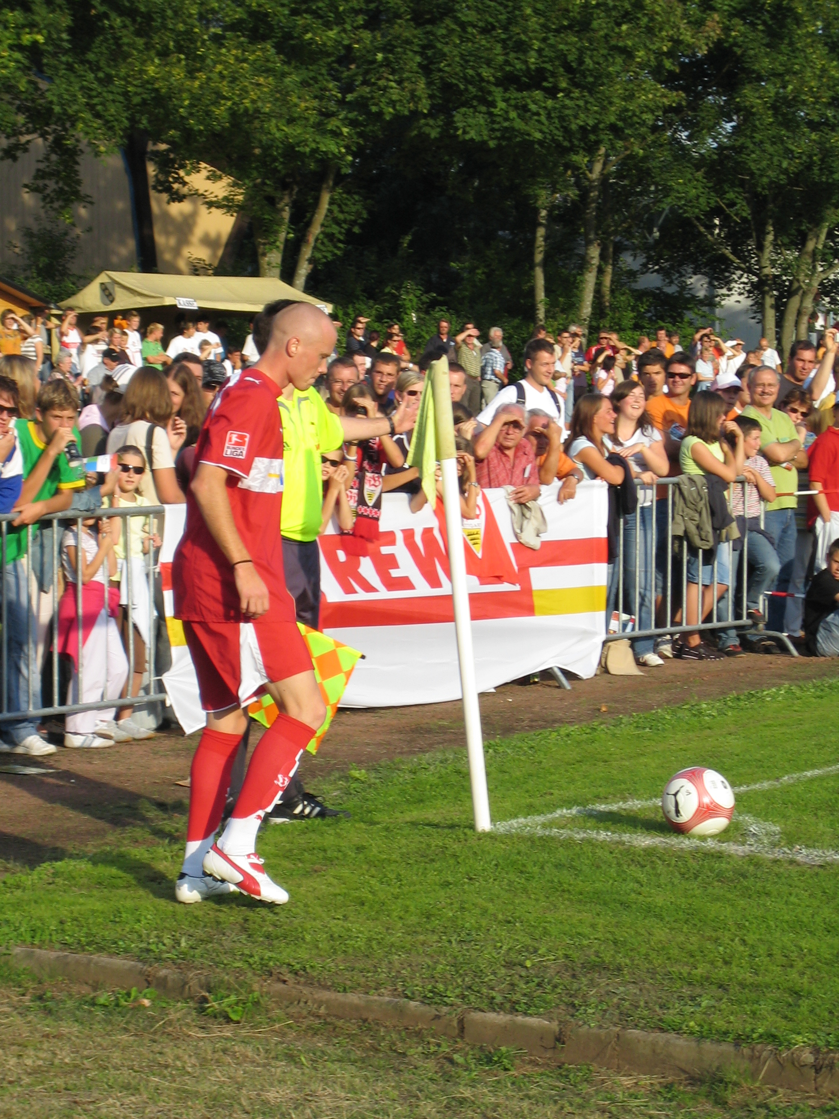 Alexander Farnerud bei einem Testspiel in Wernau